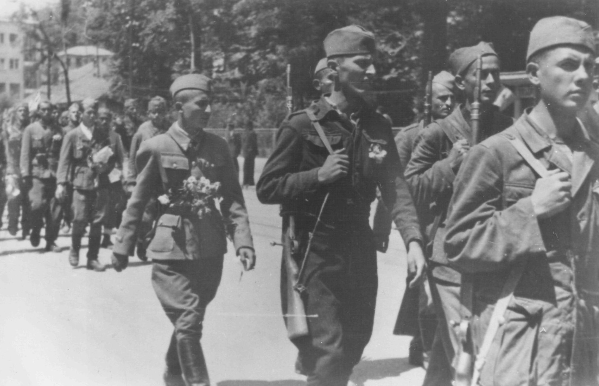 L'esercito jugoslavo entra a Sarajevo nell'aprile 1945